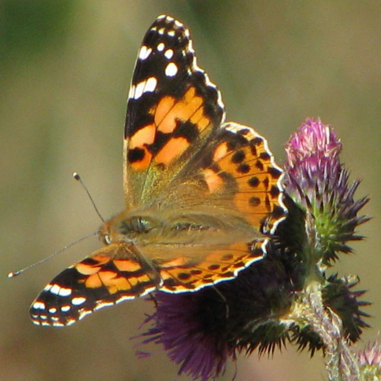 Tistelsommerfugl Vanessa cardui på krusetistel Carduus crispus ssp. multiflorus.Template:Byline